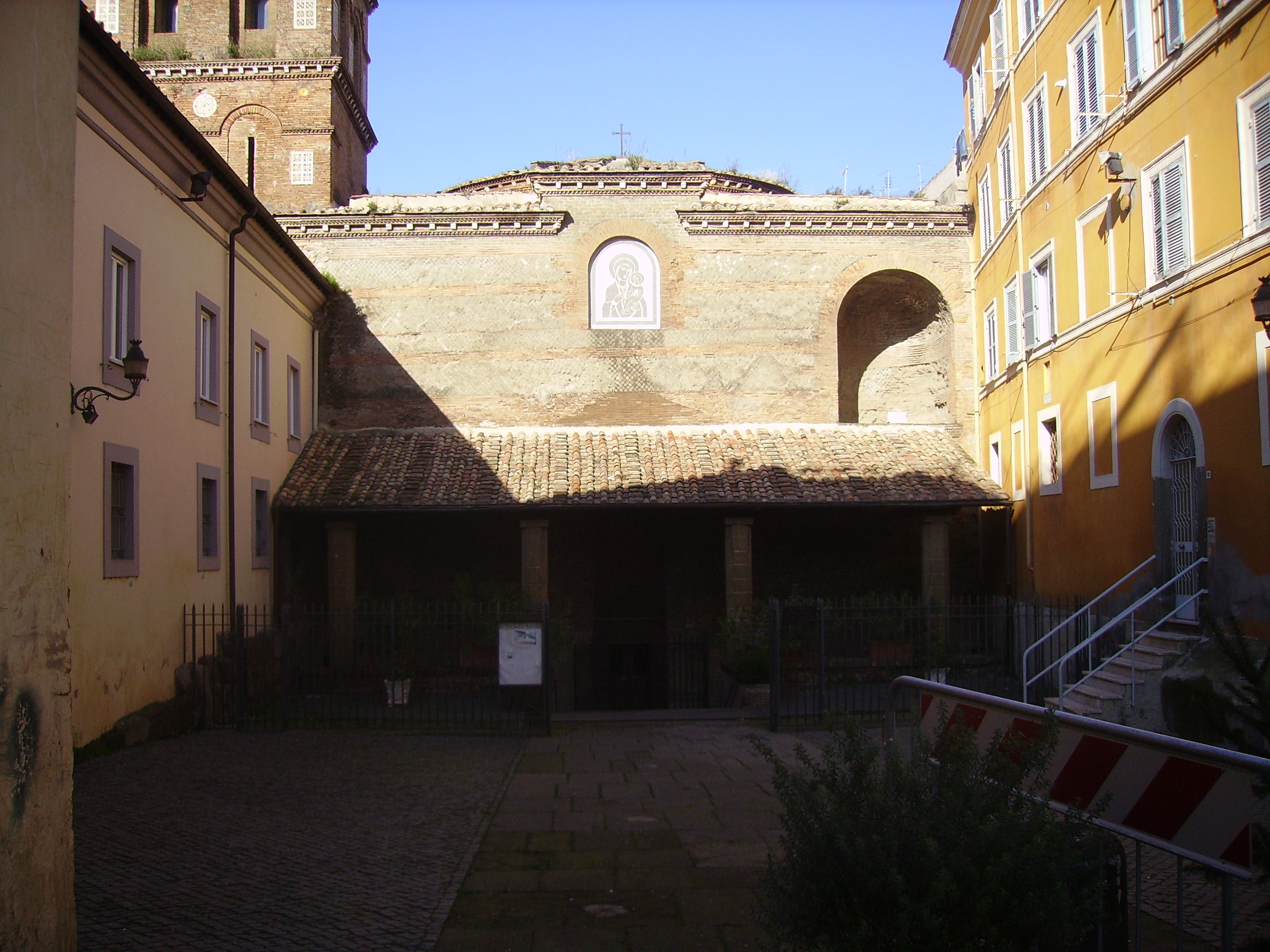 Facciata del Santuario della Rotonda ad Albano Laziale (RM)